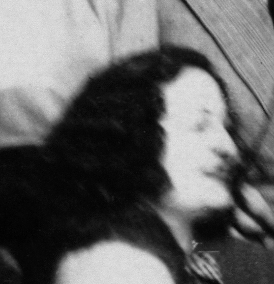 Amanda Berenguer.